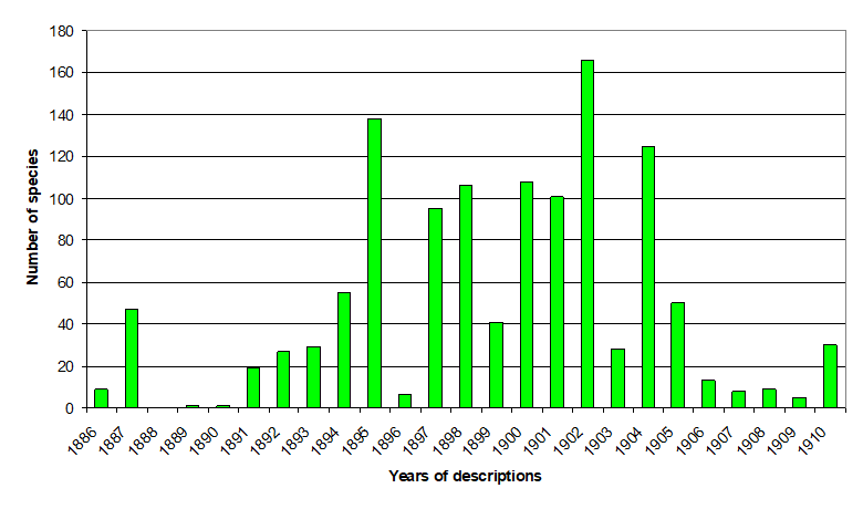 График числа описанных Даниелем Кокилетом видов, пстроенный по таблице в источнике: Evenhuis N. Nomenclatural Studies Toward a World List of Diptera Genus-Group Names. Part VI: Daniel William Coquillett (англ.) // Zootaxa. — 2018. — Vol. 4381, no. 1. — P. 1—95 —